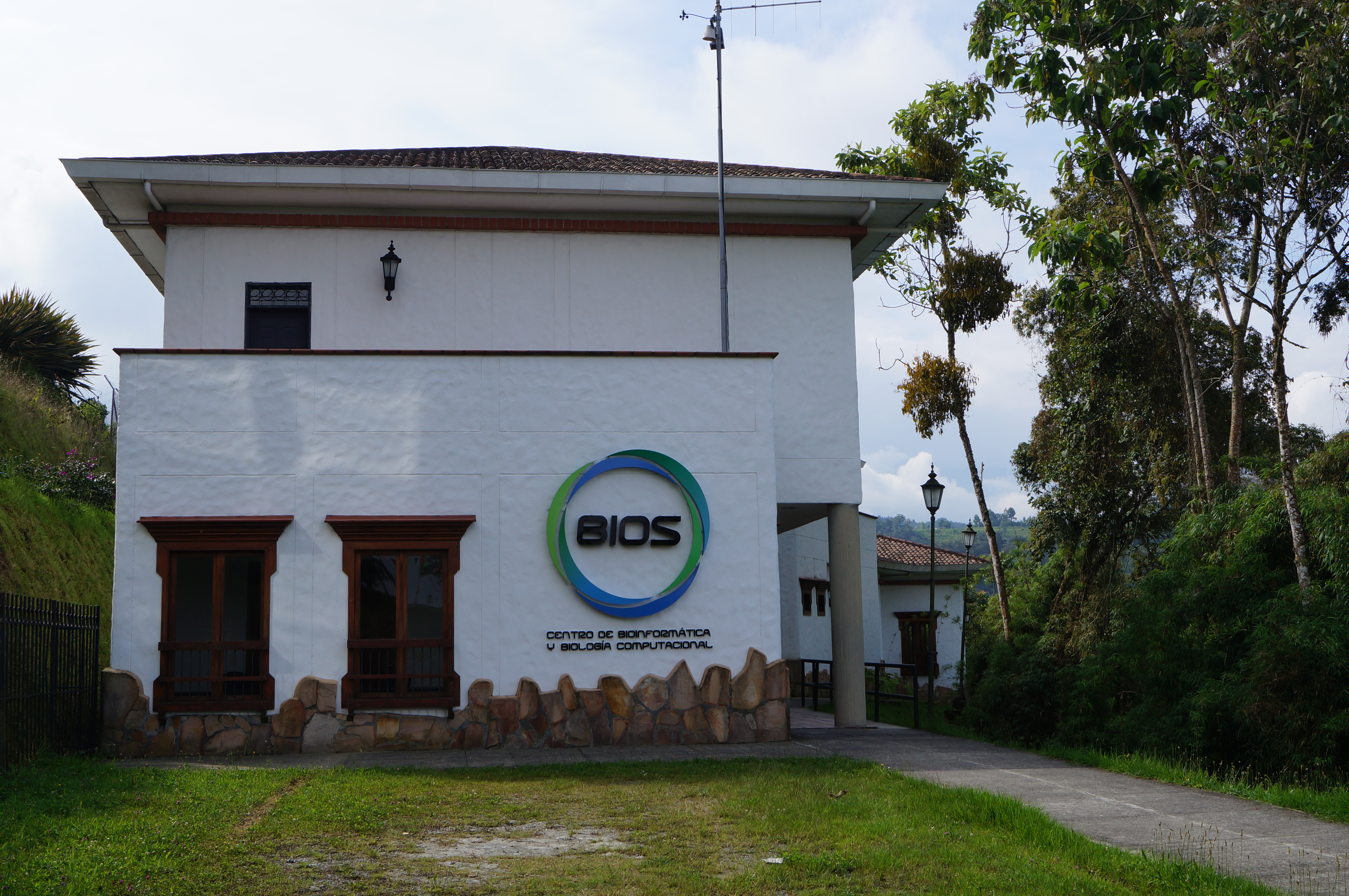 Edificio BIOS, Antigua Biblioteca Orlando Sierra